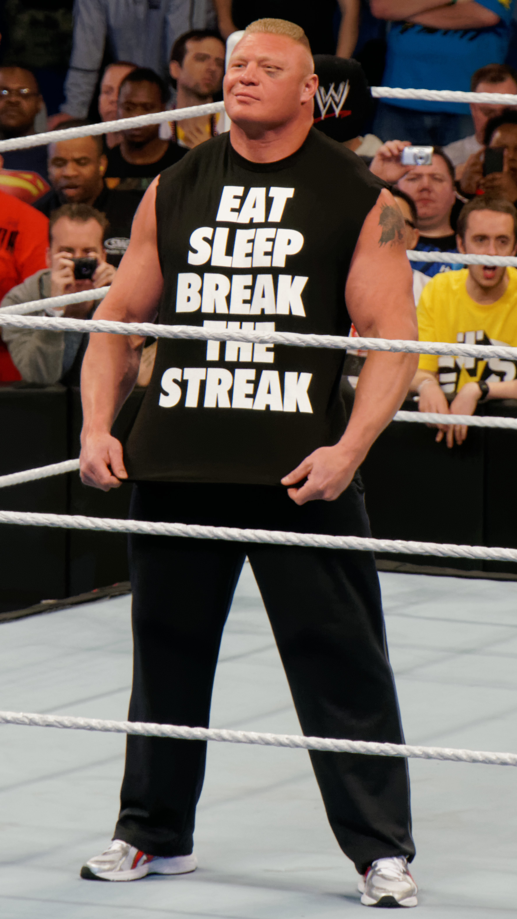 2014-04-07_20-00-09_NEX-6_1124_DxO